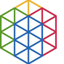 google science fair